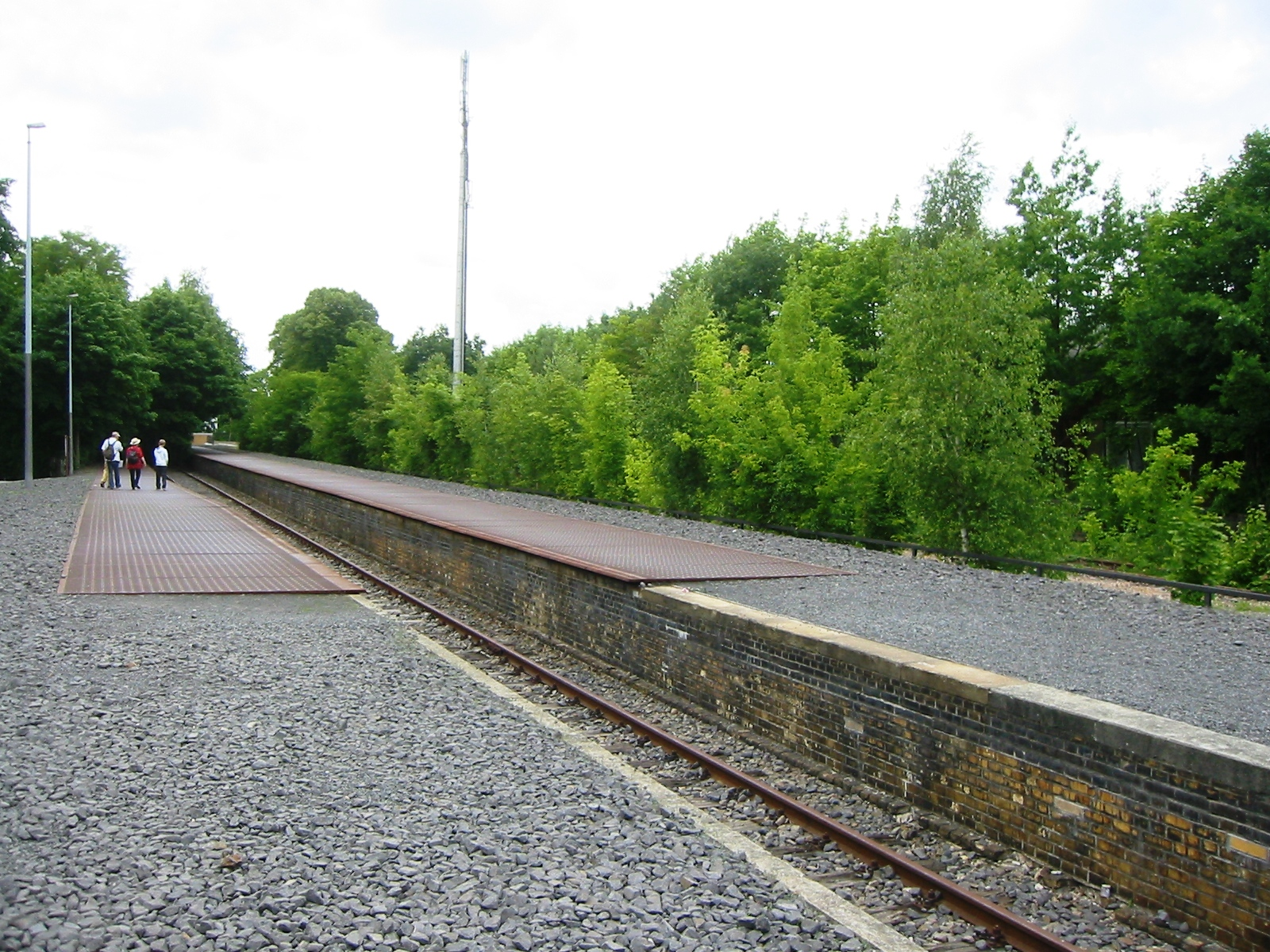 Mahnmal für 50.000 aus Berlin deportierte Juden, die mehrheitlich vom Bahnhof Grunwald abtransportiert wurden